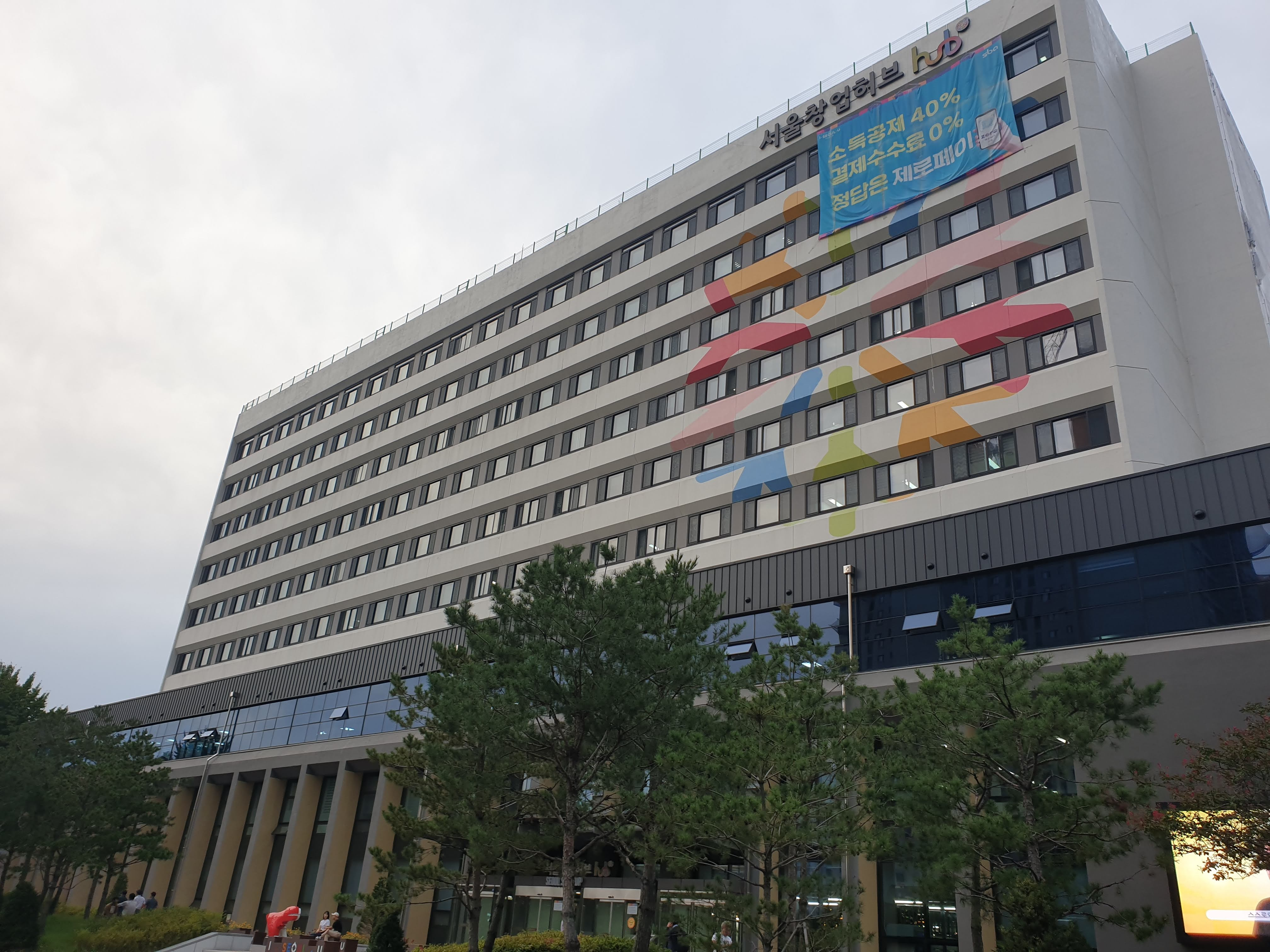 서울창업허브